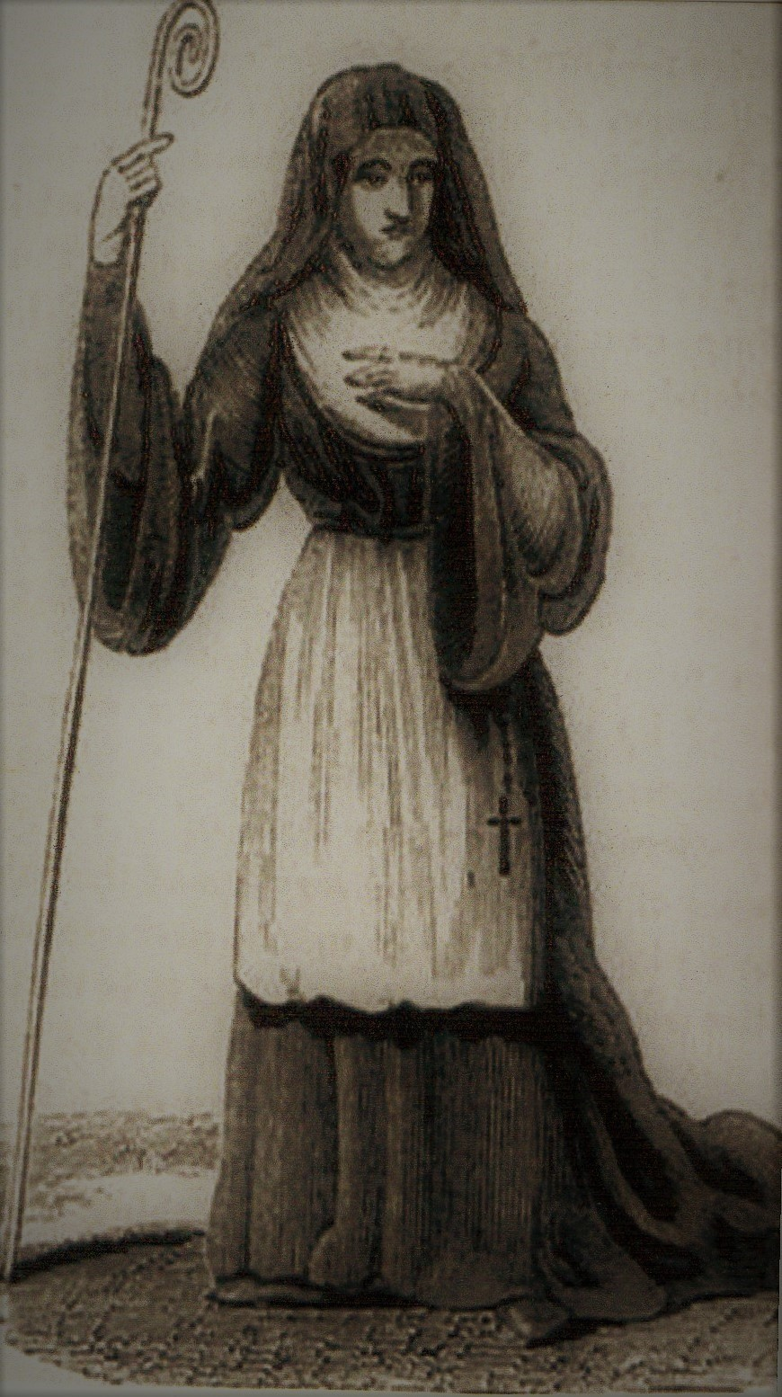 abbadessa mitrata del monastero di San Benedetto in Conversano (Puglia)